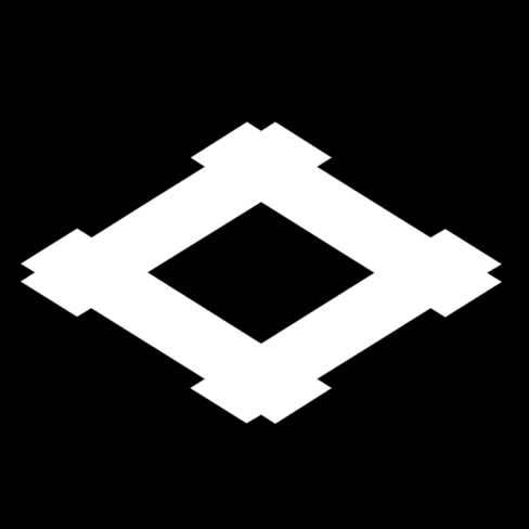 日本の家紋の一種である井桁紋の一例（井桁:いげた/igeta）